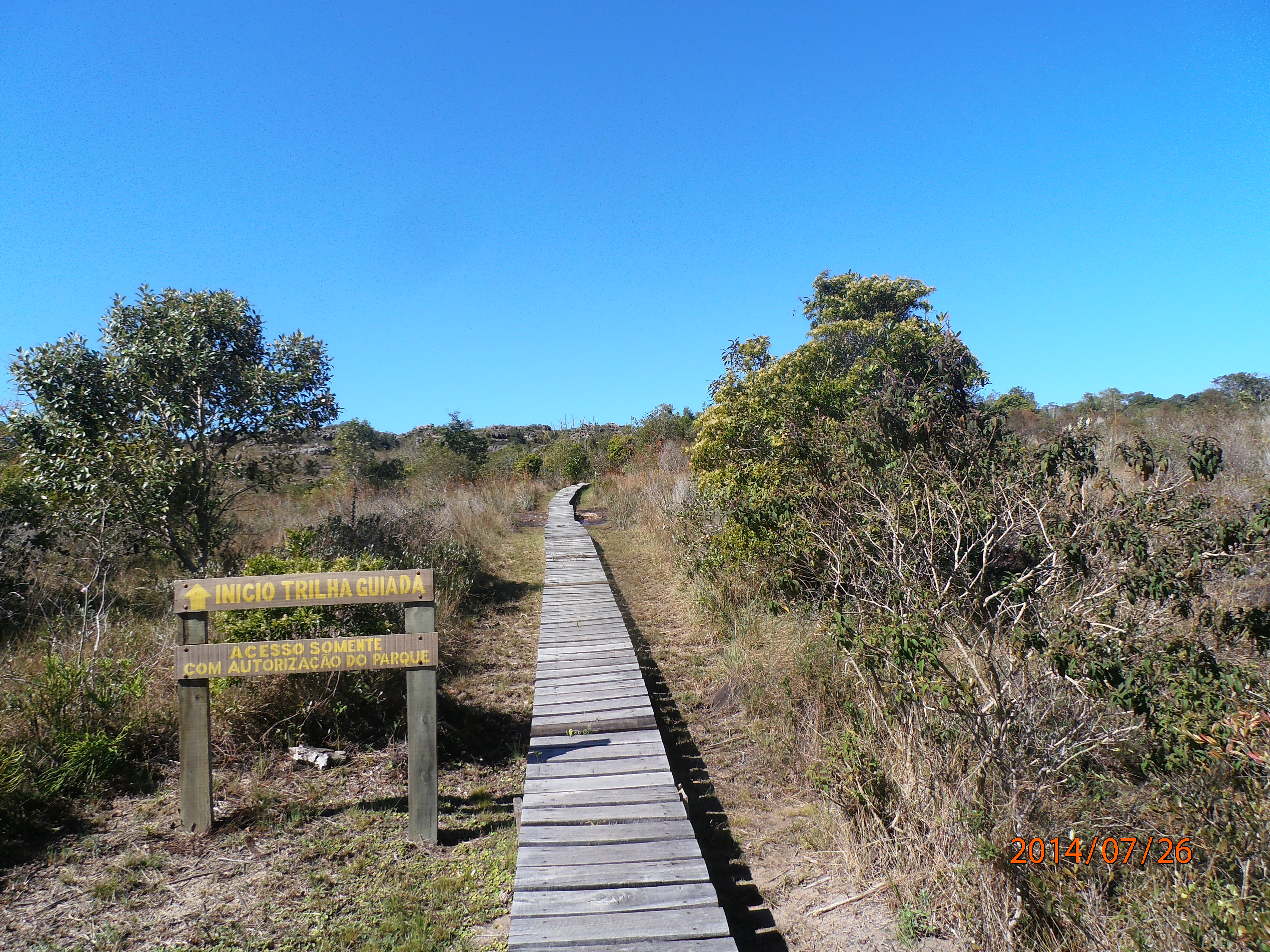 Tibagi - State of Paraná, Brazil